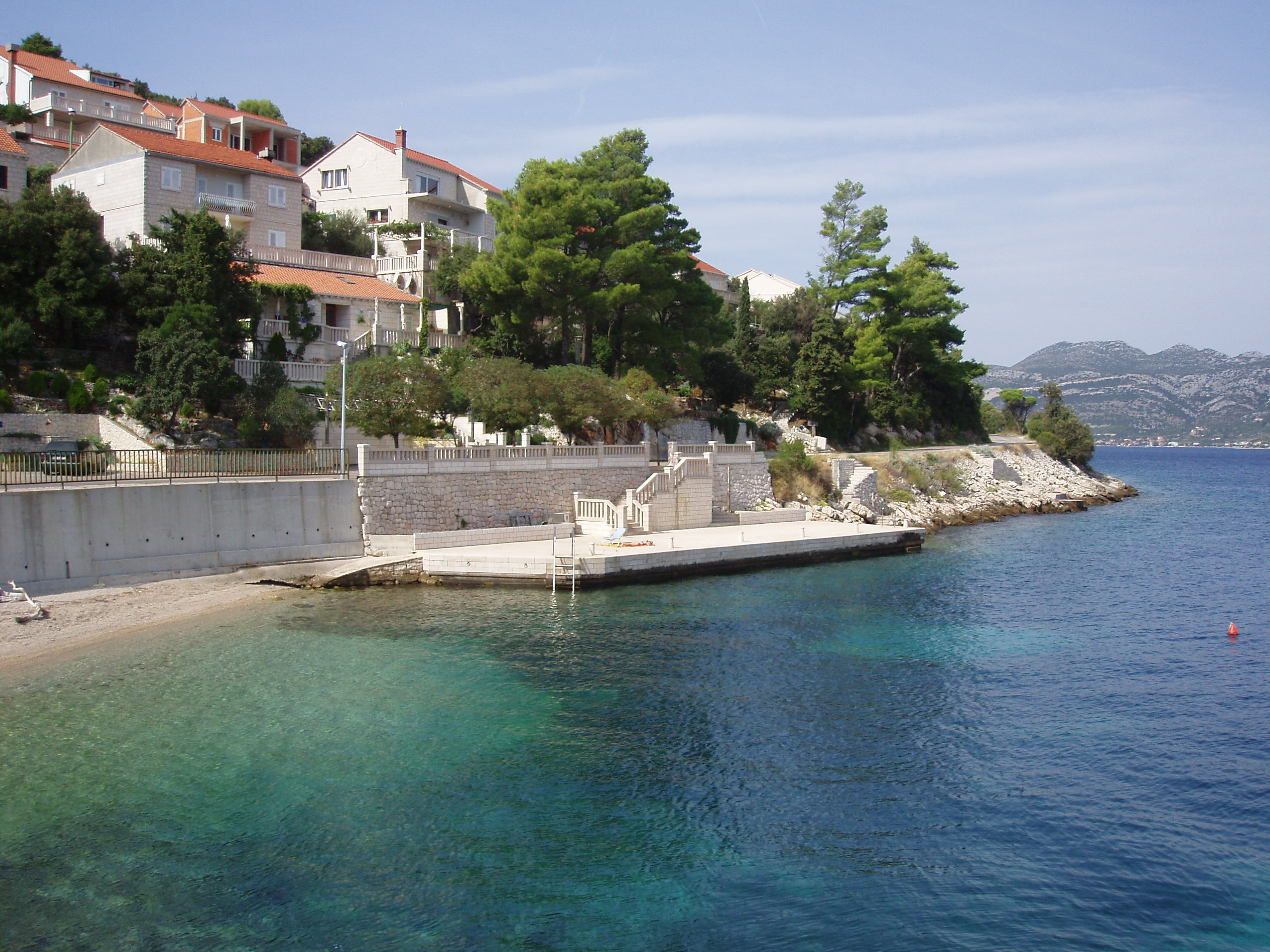 Medvinjak